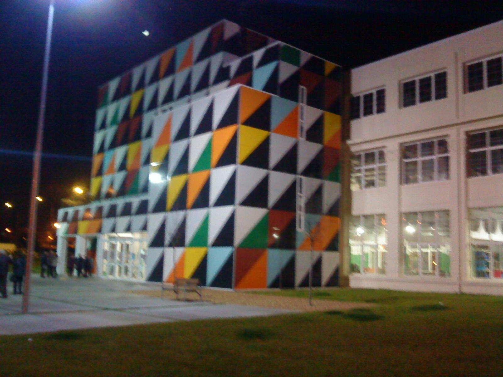 Gernika, edificio ASTRA 2012, entrada principal en la fachada trasera del antiguo edificio industrial.